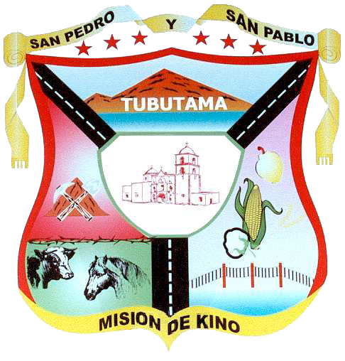 Escudo del municipio sonorense.